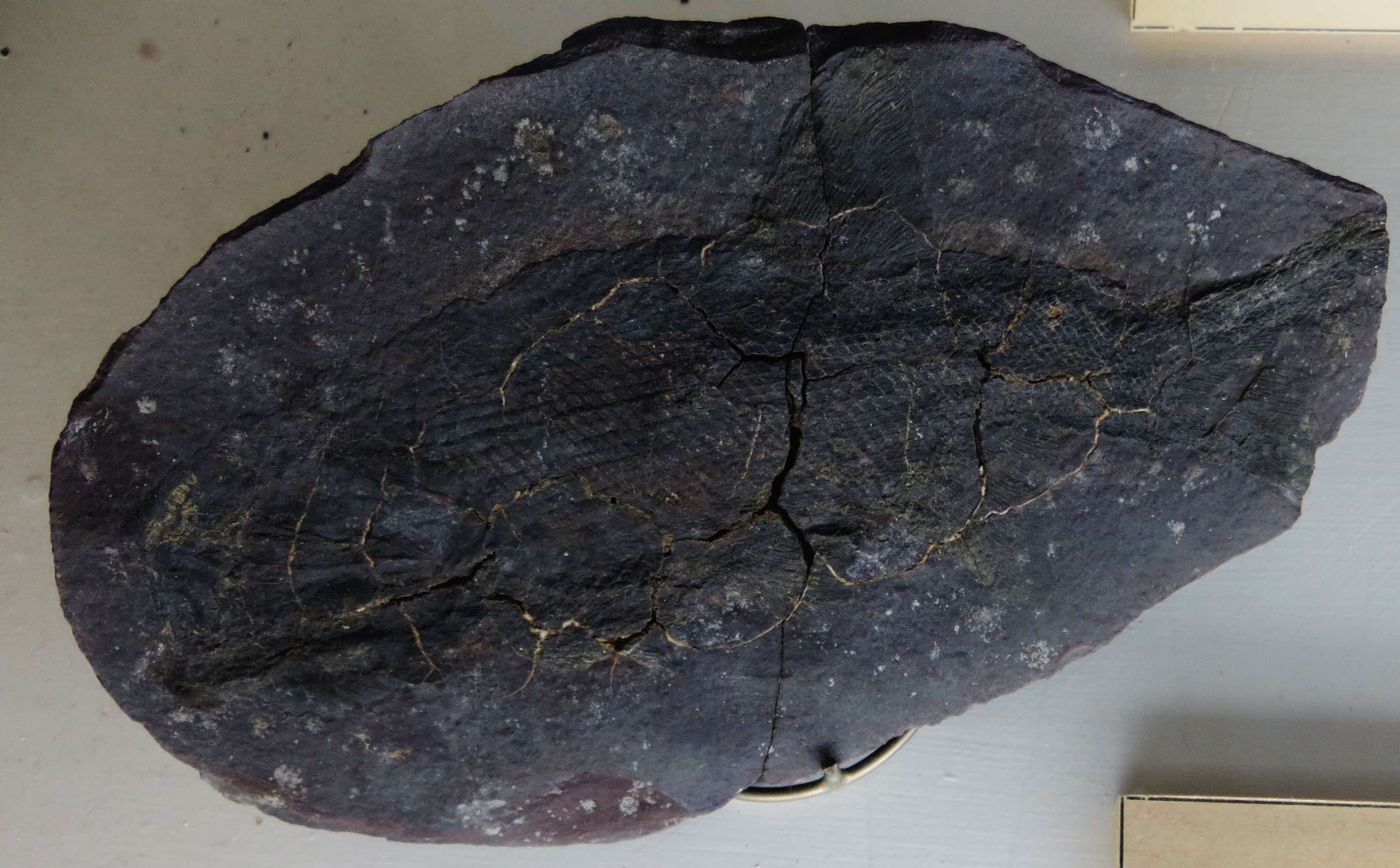 Fossil of Rhabdolepis, an extinct fish- Took the photo at Museo di Storia Naturale di Verona